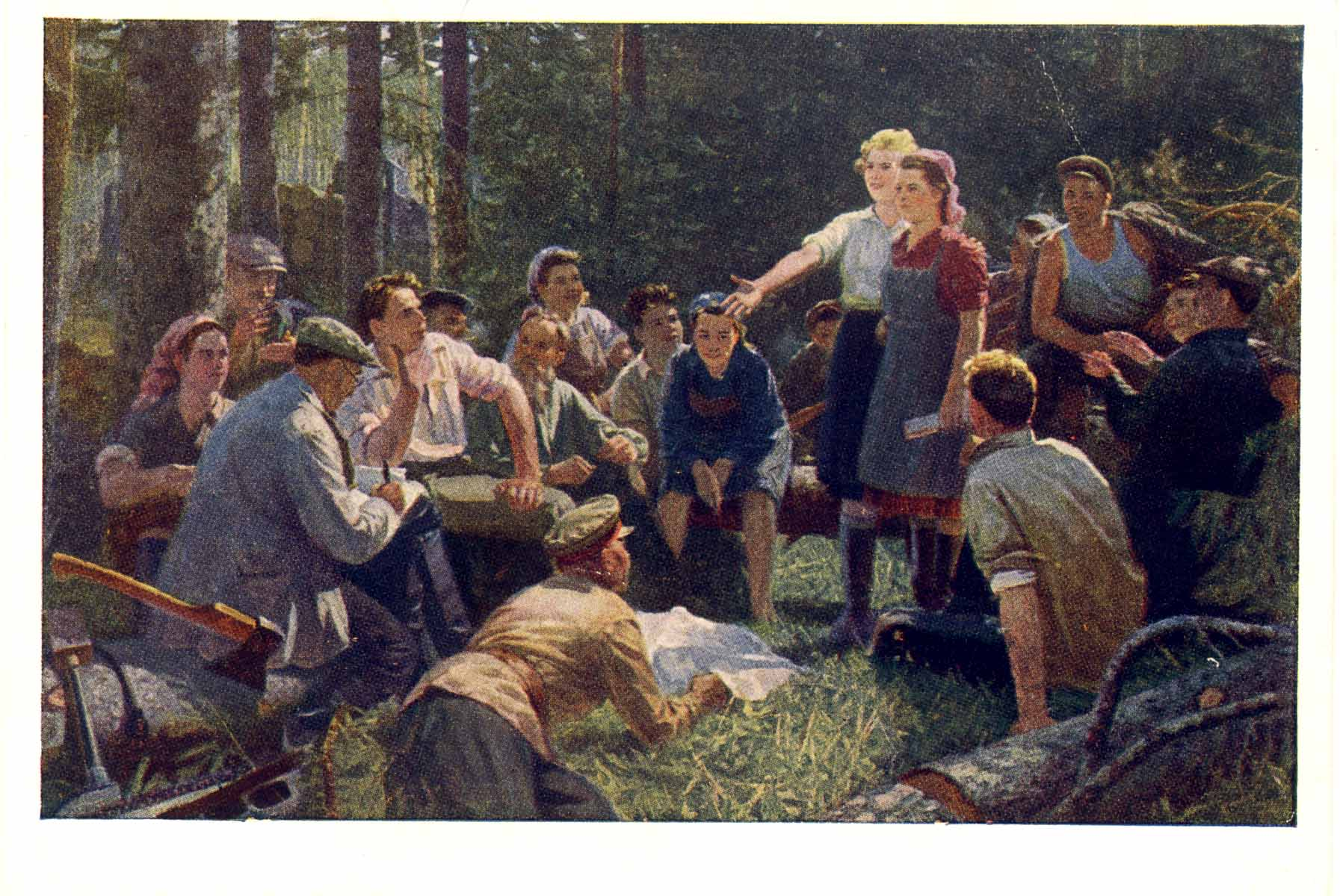 Открытка. Издательство " Советский художник " Художник E. И. Самсонов картина Вызов на соцсоревнование.